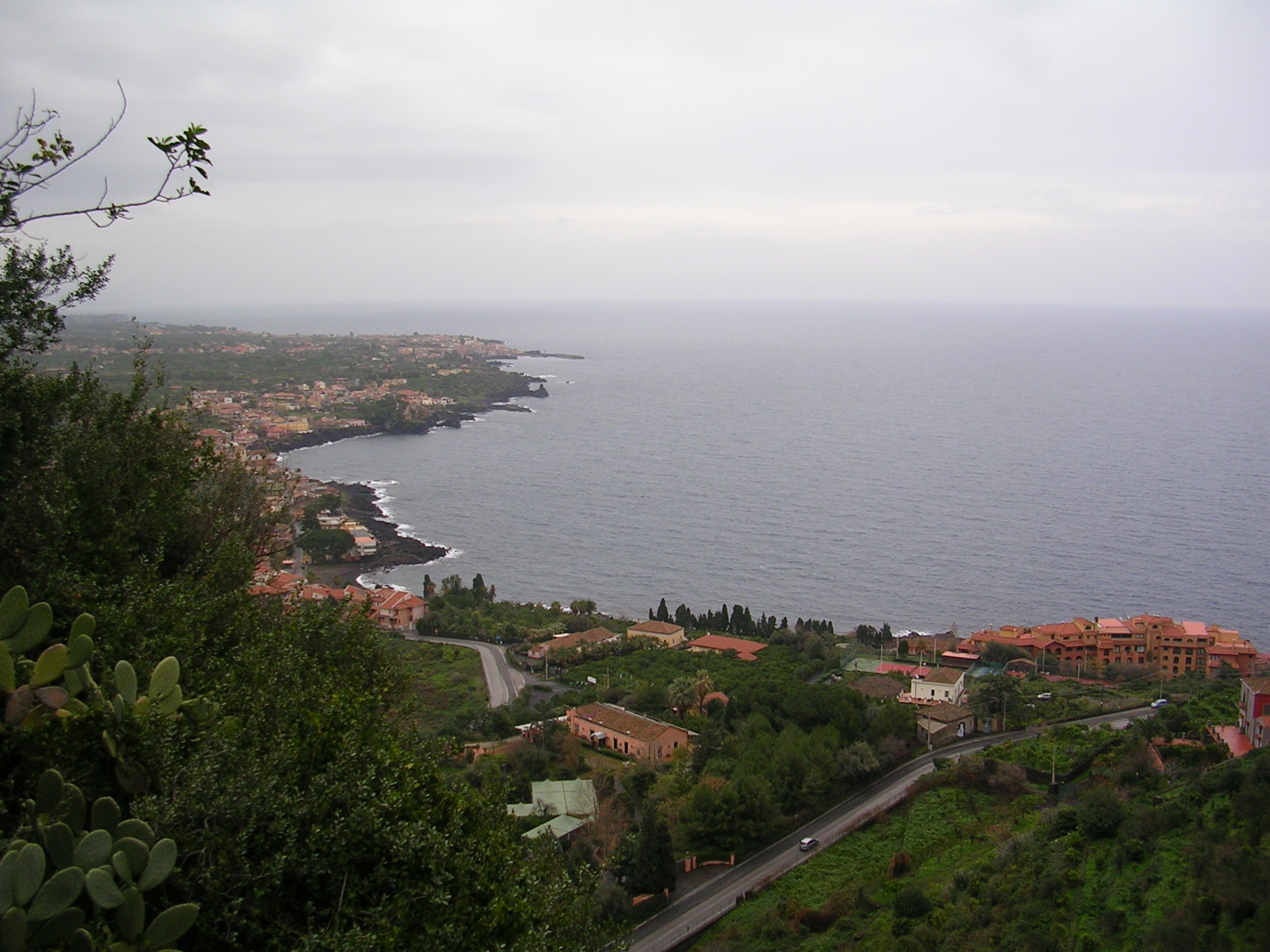 Santa Tecla, frazione di Acireale